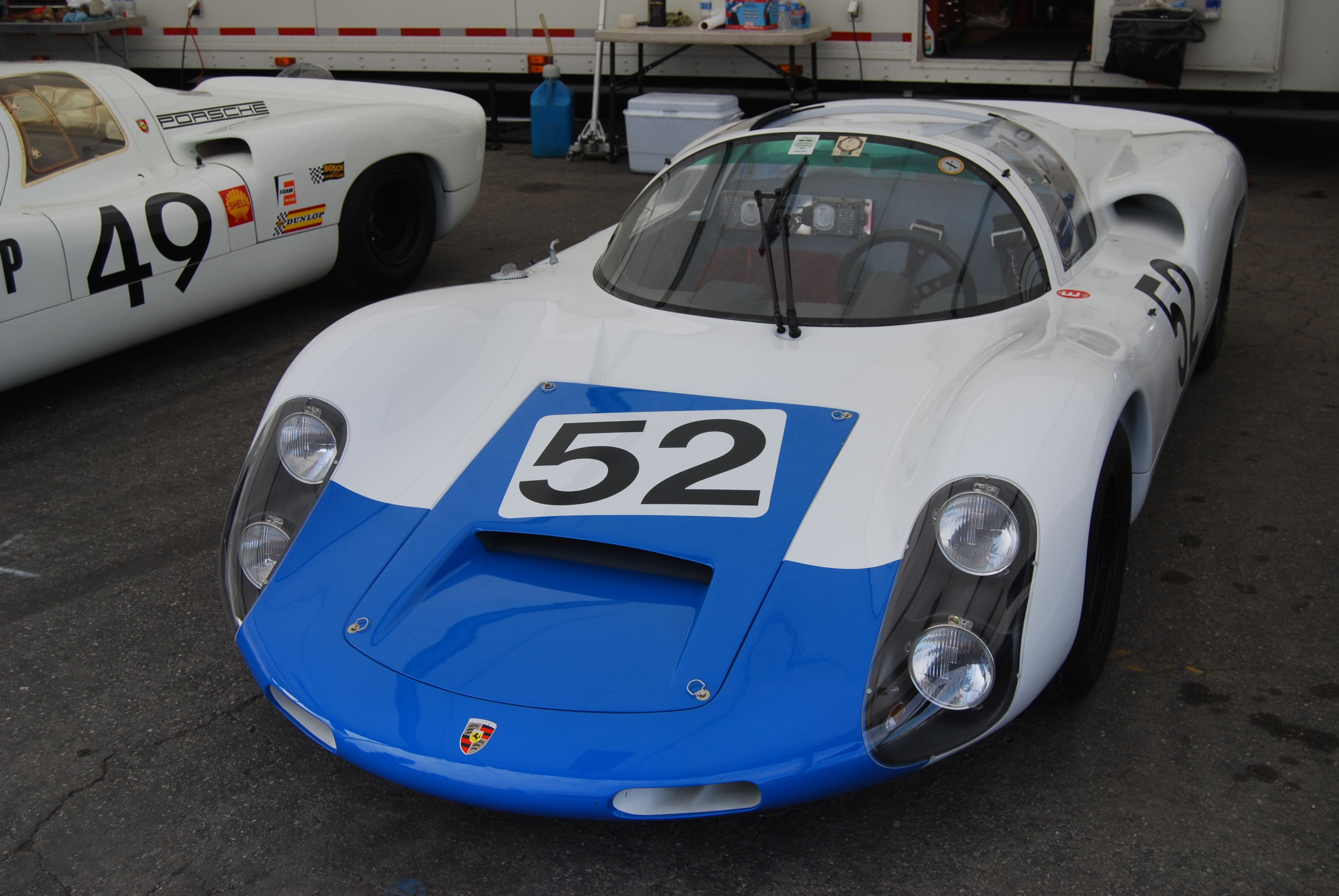 10i5_DSC_0417